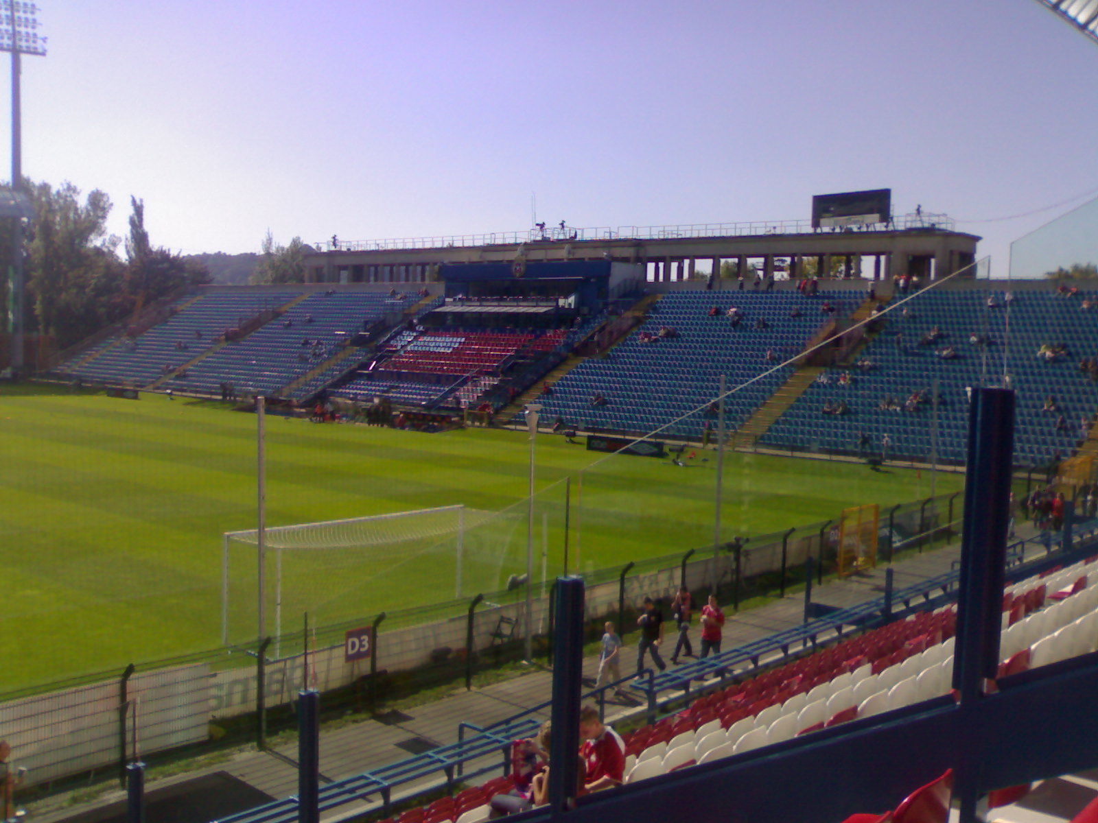 Stadion TS Wisła Kraków - Sektory A i B przed meczem z Polonią Bytom.